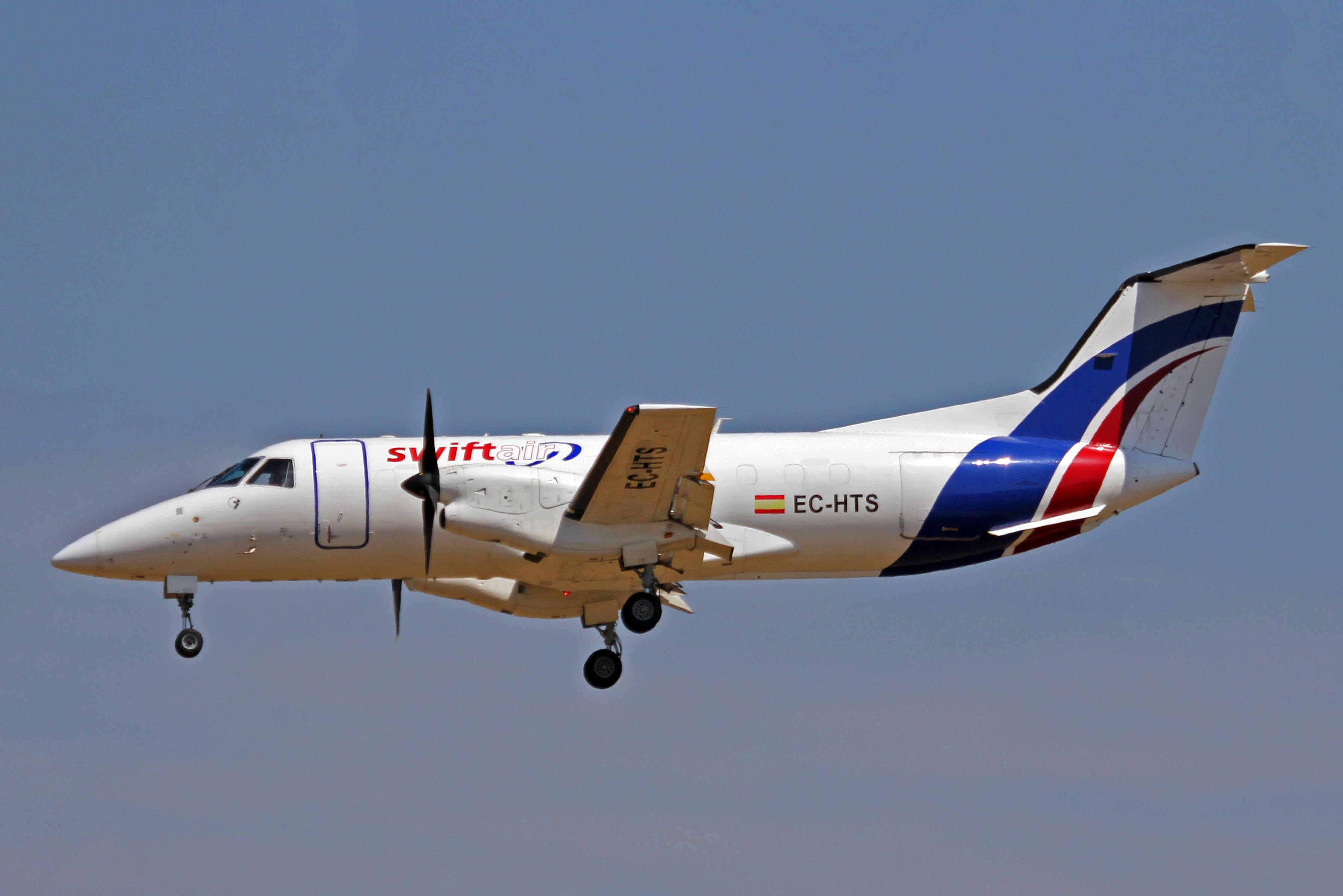 Avió de Swiftair a l'aeroport de Palma de Mallorca.